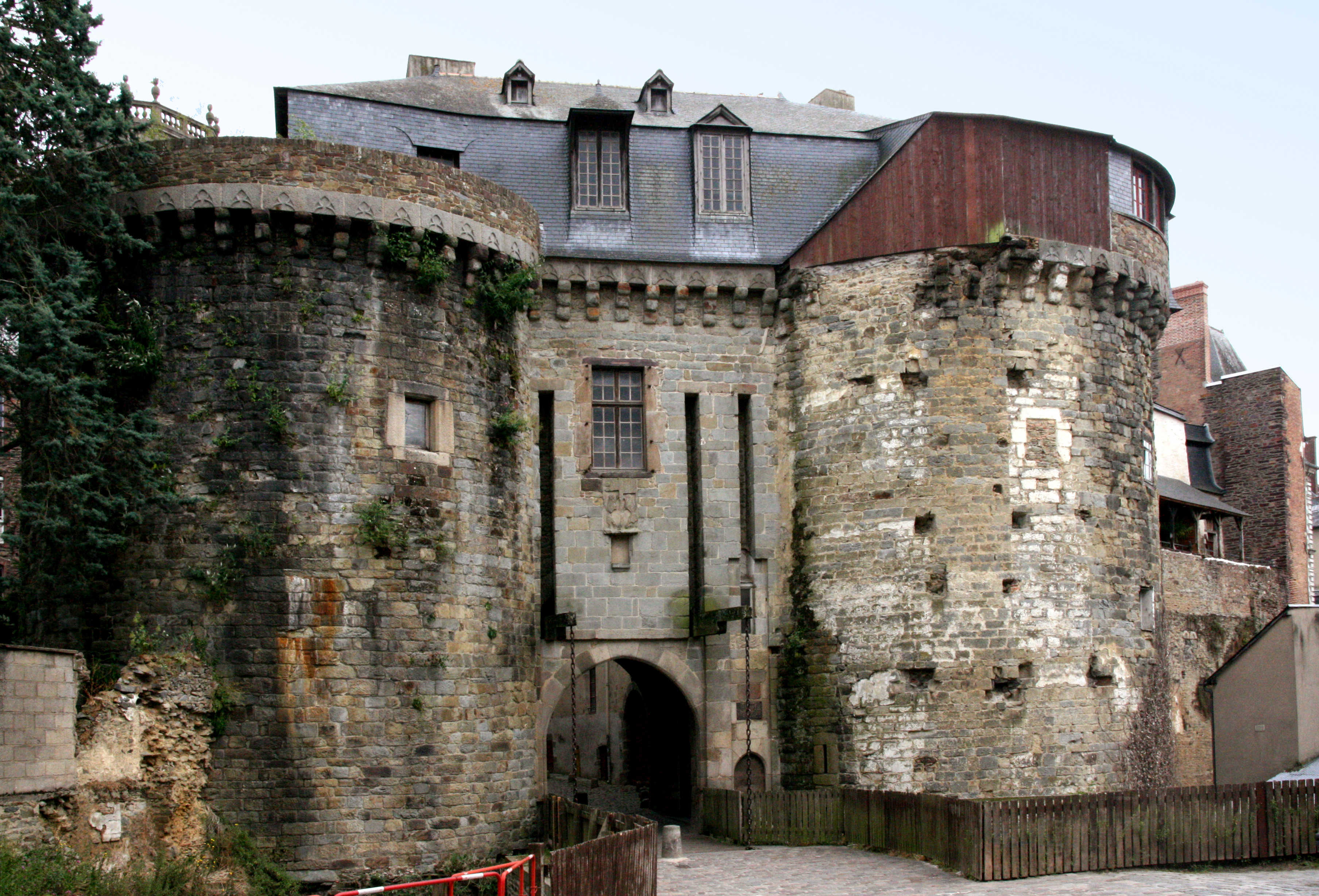 Les Portes Mordelaises vue de l'extérieur des remparts, à Rennes.